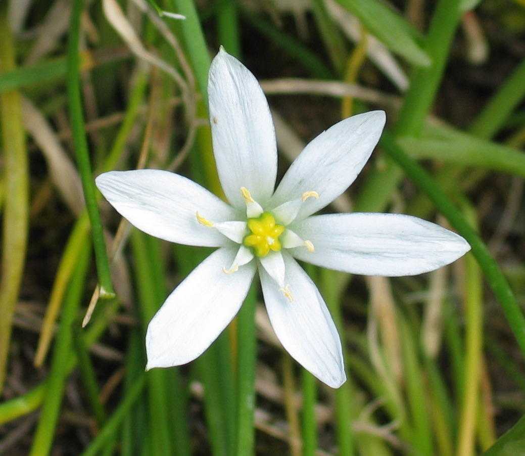 Dolden-Milchstern (Ornithogalum umbellatum), Hyazinthengewächse (Hyacinthaceae), am Ufer der Glatt nähe Rümlangen (CH)